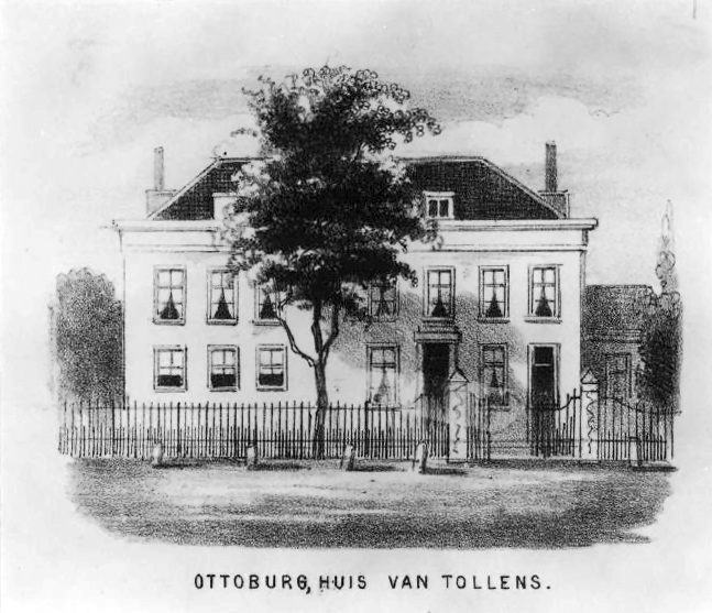 Huis Ottoburg in Rijswijk. Hendrik Tollens used to live here from 1846 till 1856